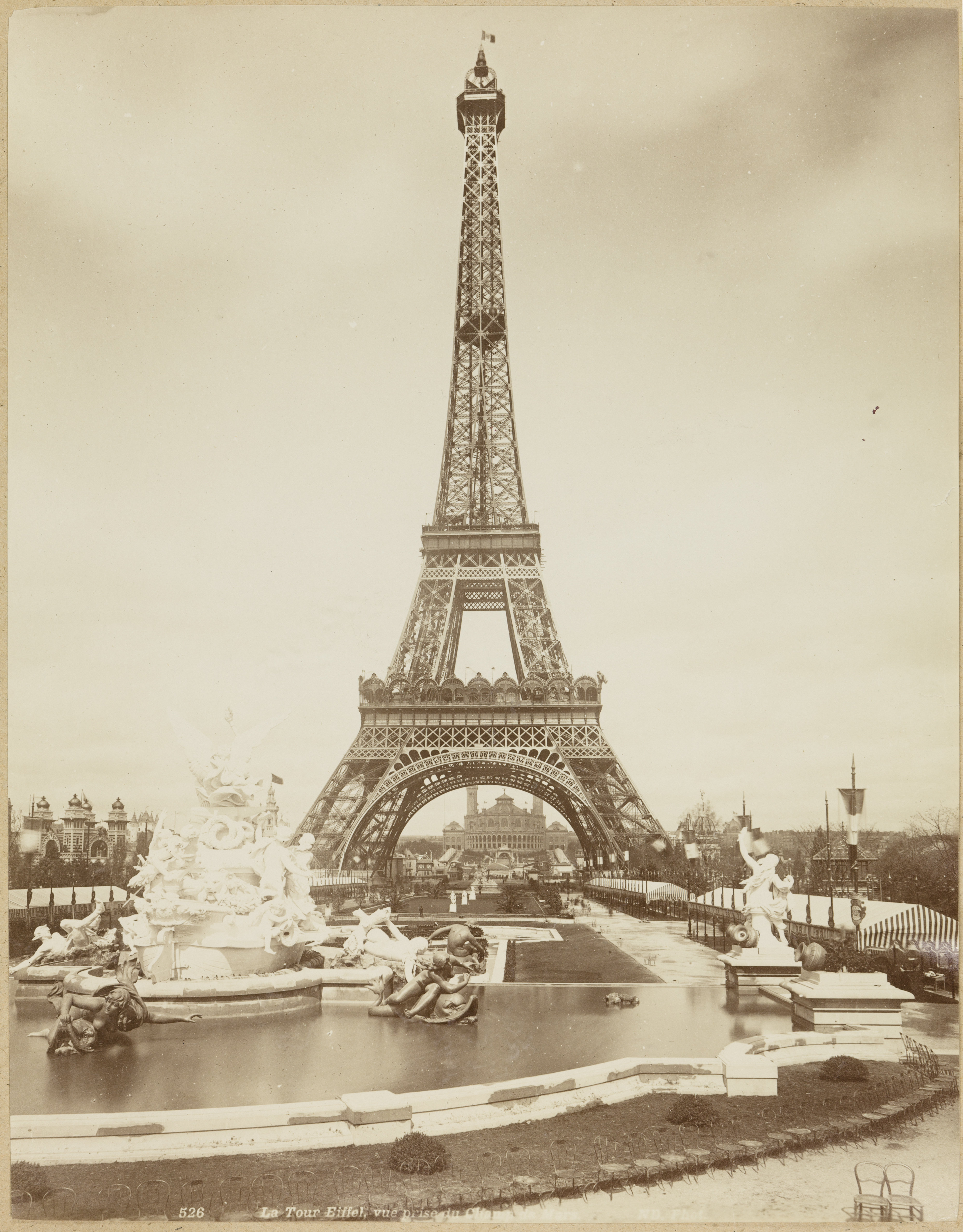 Eiffel -torni kuvattuna Champs du Mars -puiston suunnasta. Pariisin maailmannäyttely 1889 TaiKM:01:006 Aalto-yliopisto / Aalto University Tiedätkö lisää tästä kuvasta? Jätä kommentti tai ota yhteyttä sähköpostitse: Lisätietoja kuvakokoelmista / more information